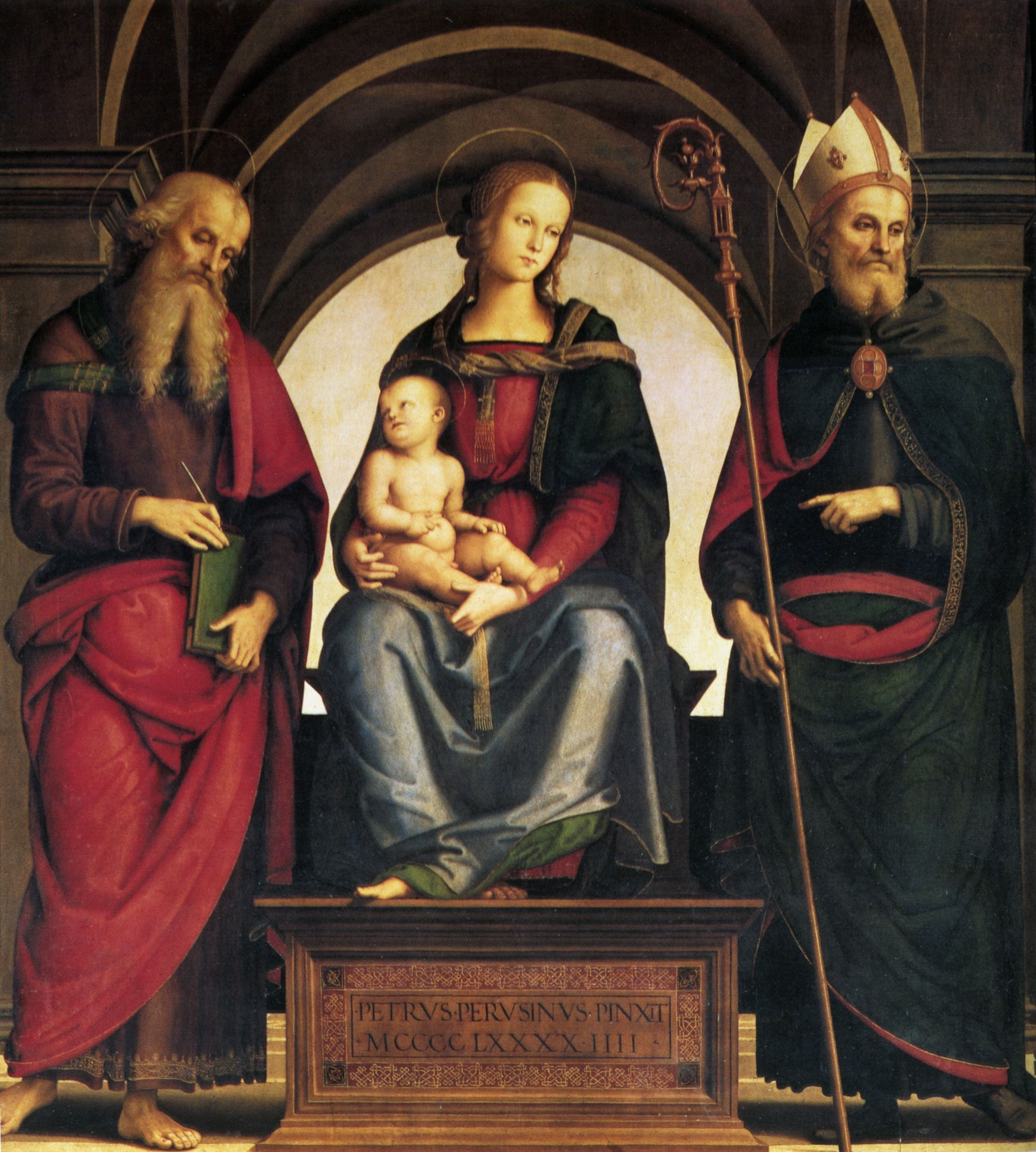 Pietro Perugino: Madonna in trono col Bambino tra i santi Giovanni e Agostino. Cat. no. 38 in Vittoria Garibaldi: Perugino. Catalogo completo. Octavo, Firenze 2000, ISBN 88-8030-091-1